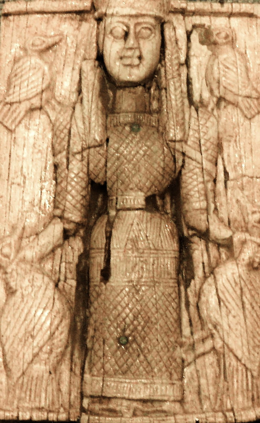 Représentation de la déesse Artémis Orthia sur une plaque d'ivoire, ex-voto retrouvé dans son sanctuaire. La déesse est représentée tenant des oiseaux (allusion au marais dans lequel est construit le sanctuaire) et couronnée d'un diadème de roseaux. Musée archéologique national, Athènes.